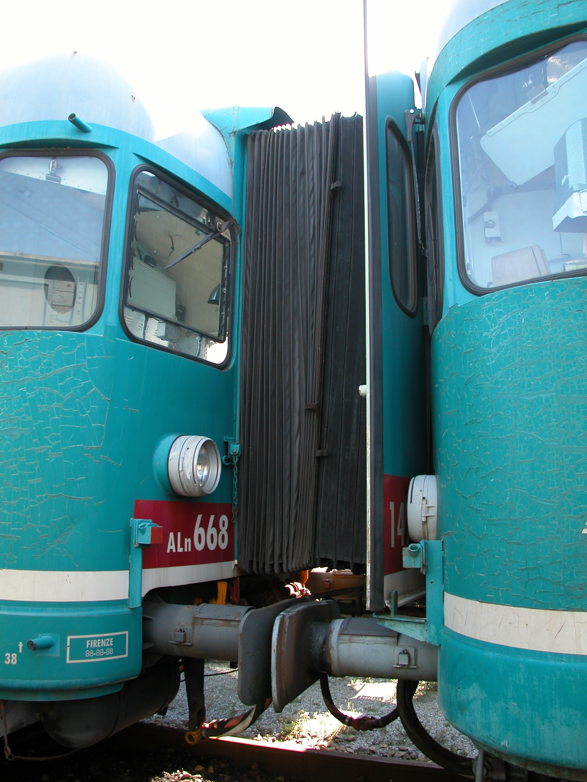 Intercomunicazione tra le automotrici FS ALn 668.1462 e 1478. Il mantice di intercomunicazione dell'ALn 668.1462 (a sinistra nella foto) fu aggiunto sulla parte esterna del frontale dopo la costruzione dell'automotrice. Il mantice dell'ALn 668.1478 (a destra) fu installato all'atto della costruzione in uno scomparto chiuso da una porta a doppio battente di cui è visibile un'anta a lato del soffietto.